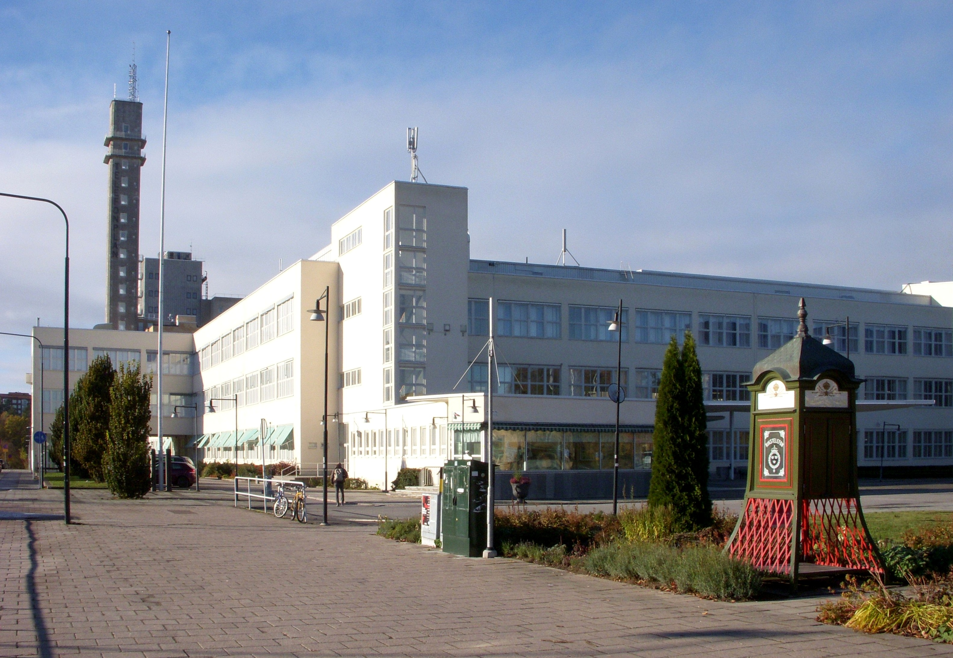 LM Ericsons byggnad i Västberga